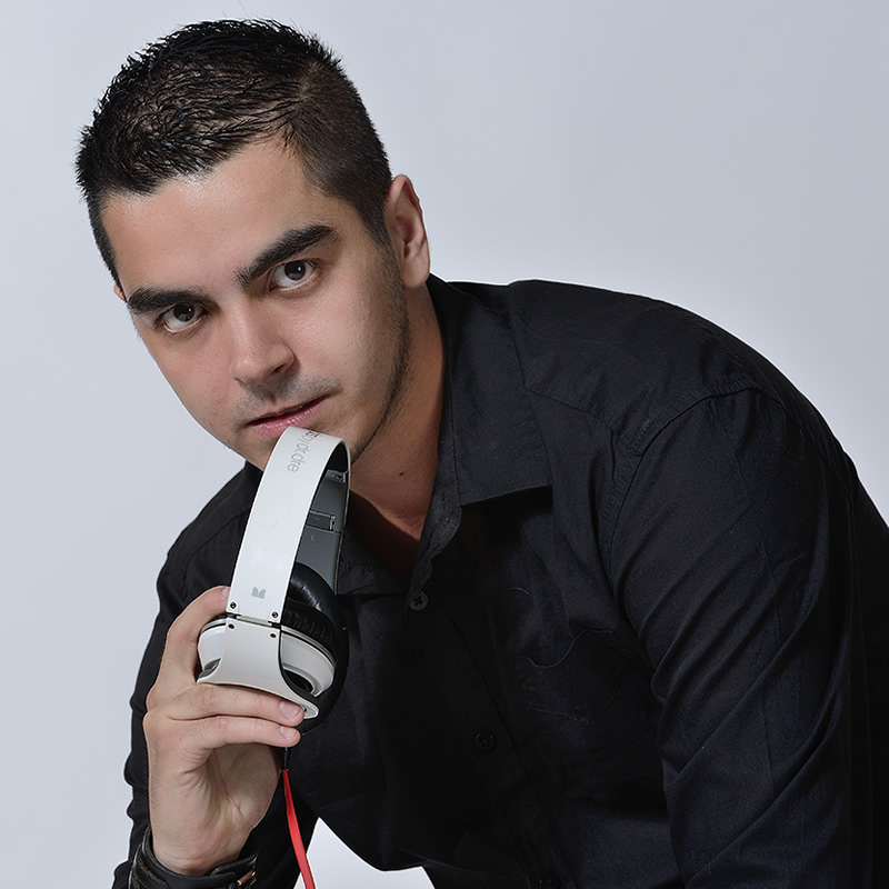 DJ Jackson 2013